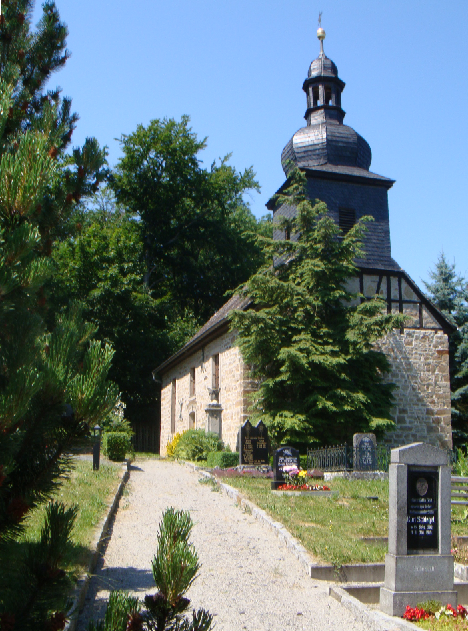 Wersdorf Kirche 2010